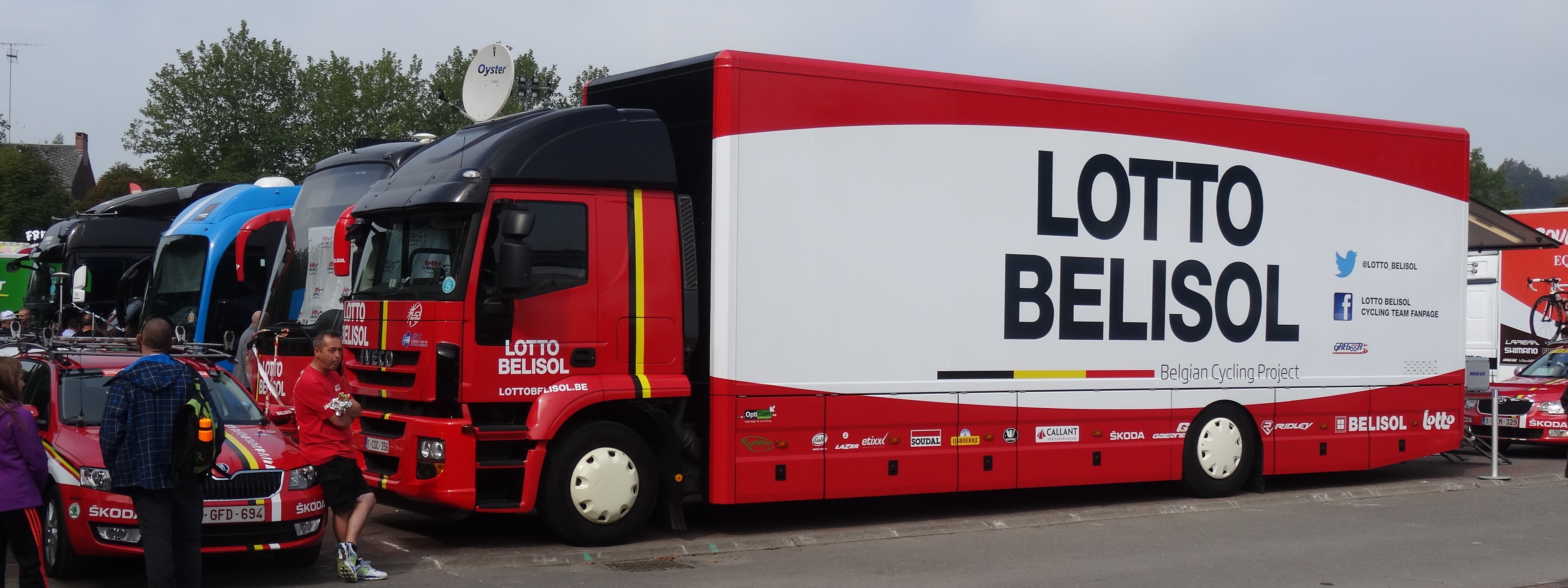 Reportage photographique réalisé le dimanche 7 septembre à l'occasion du départ et de l'arrivée du Grand Prix de Fourmies 2014 à Fourmies, Nord-Pas-de-Calais, France.